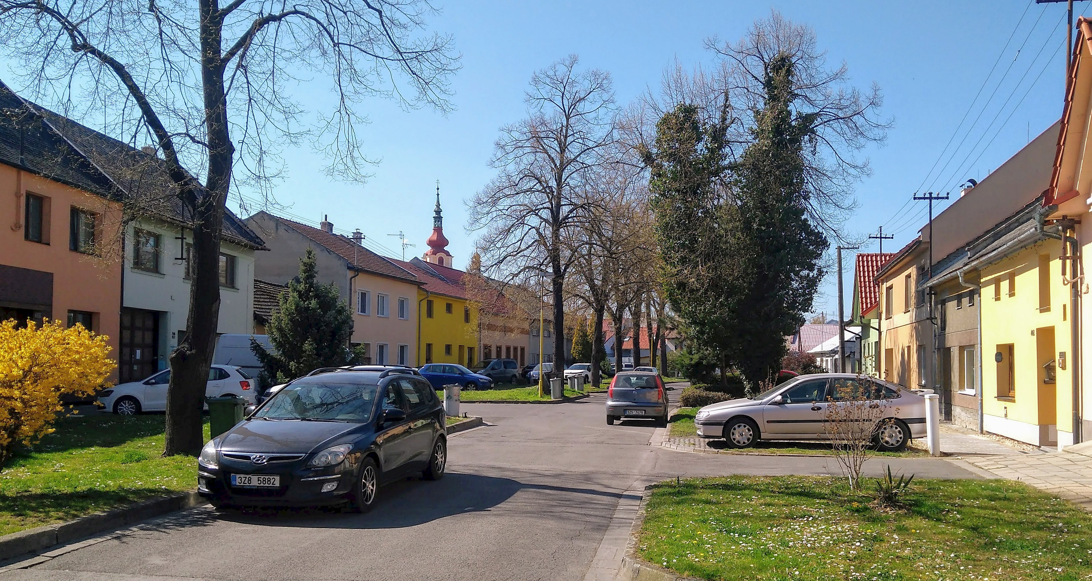 Hulín, Havlíčkova ulice